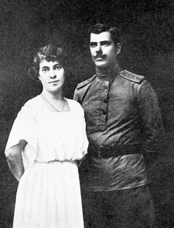 Надзея Васільеўна і Сямён Цімафеевіч - бацькі Ул. Караткевіча